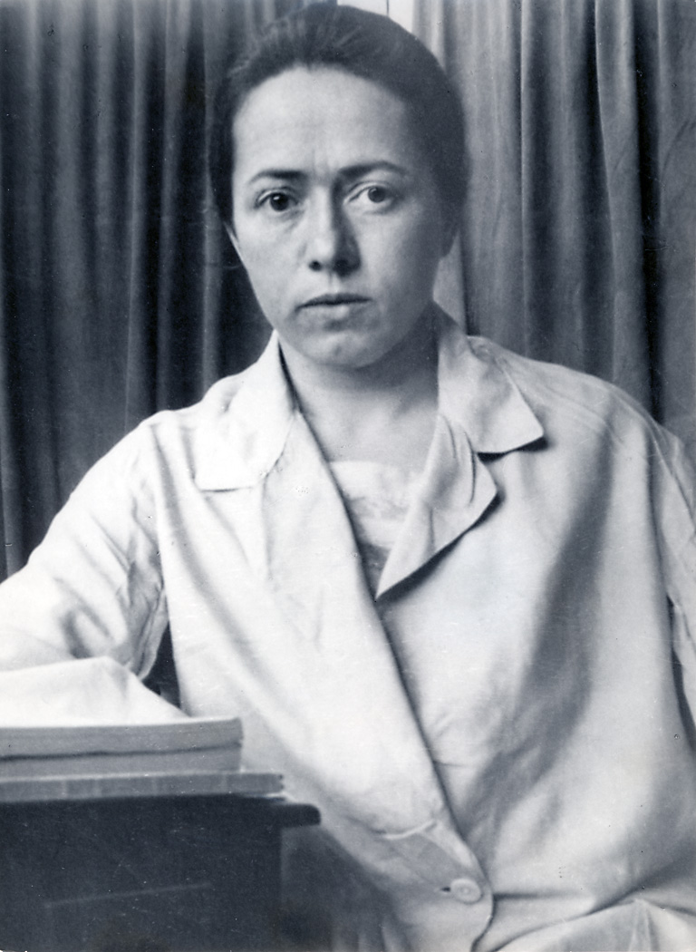 Vlasta Kalalova